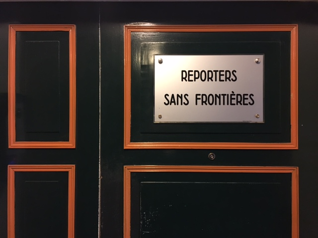 Siège de RSF